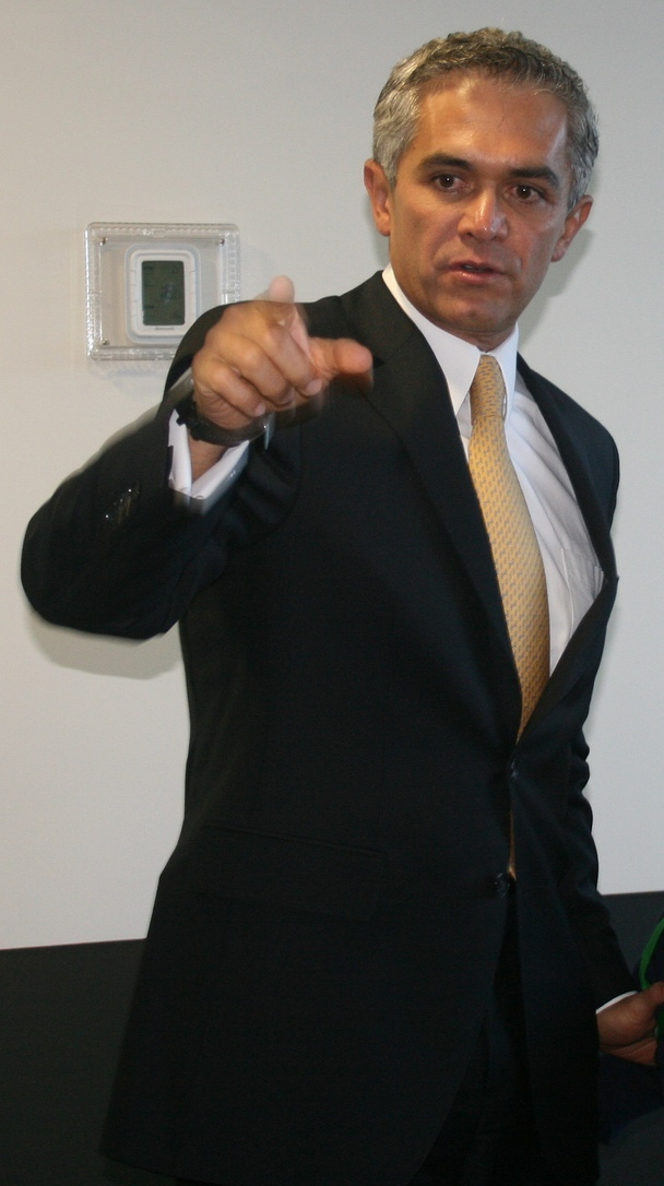 21008. México; D.F.- Entrega de constancia de Jefe de Gobierno Electo. En la imagen el DR. Miguel Ángel Mancera.